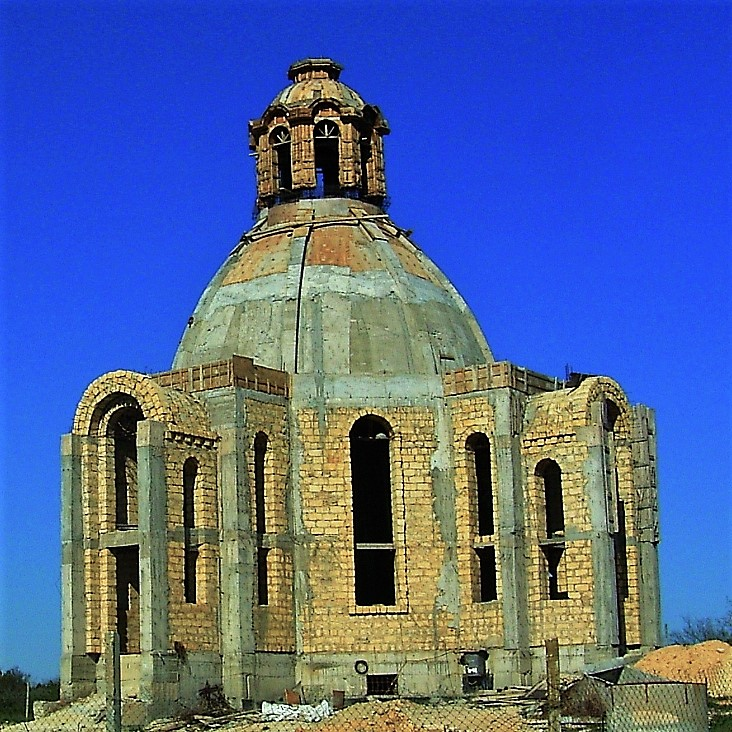 Строительство церкви в Новоозёрном